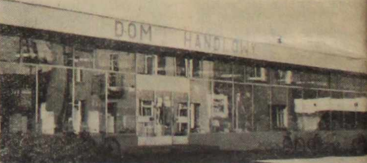 Dom handlowy w Łączniku